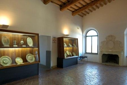 sala del camino nel Museo regionale della ceramica di Deruta